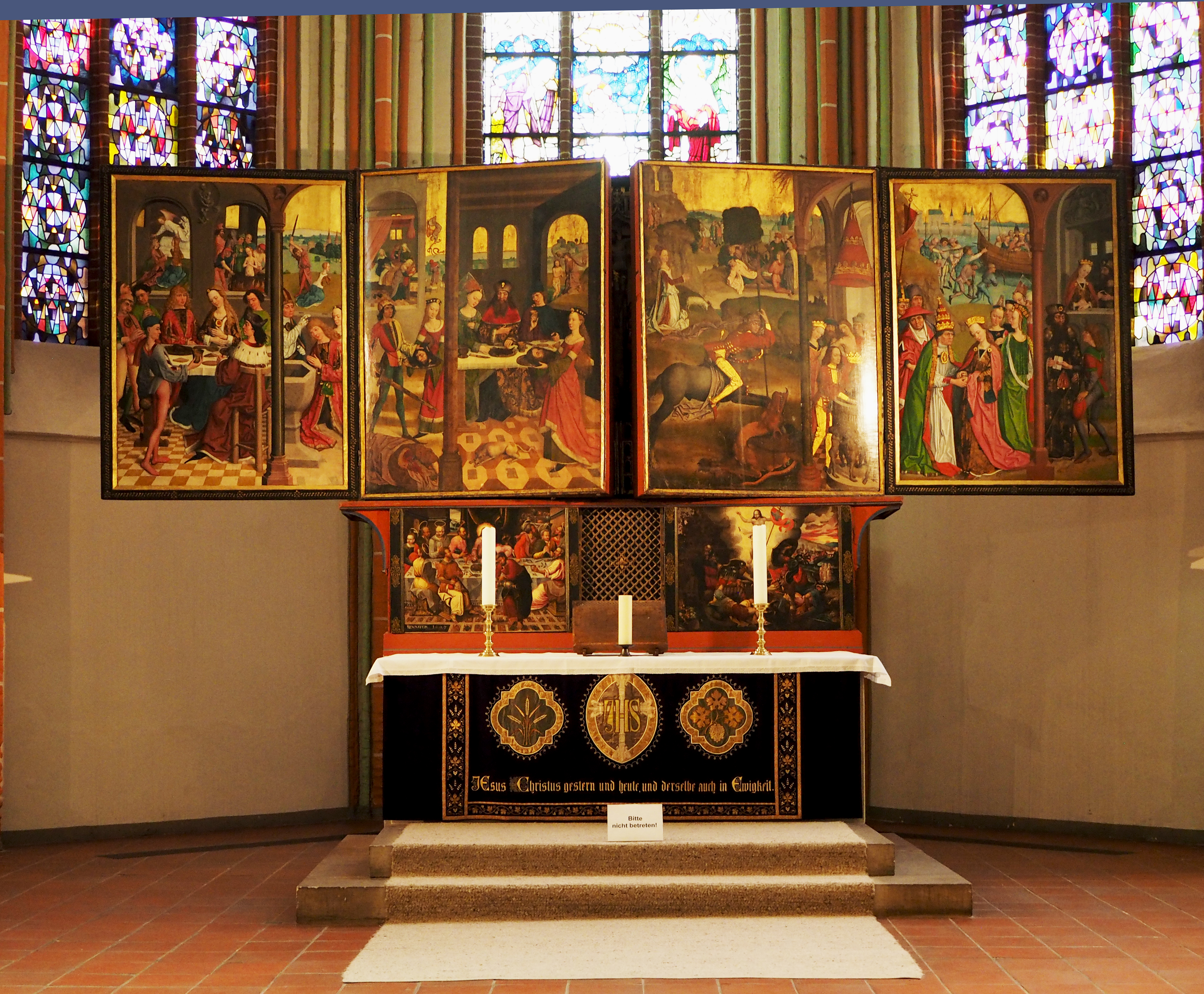 Hauptaltar (Flügelaltar) in der Kirche St. Johannis, Lüneburg